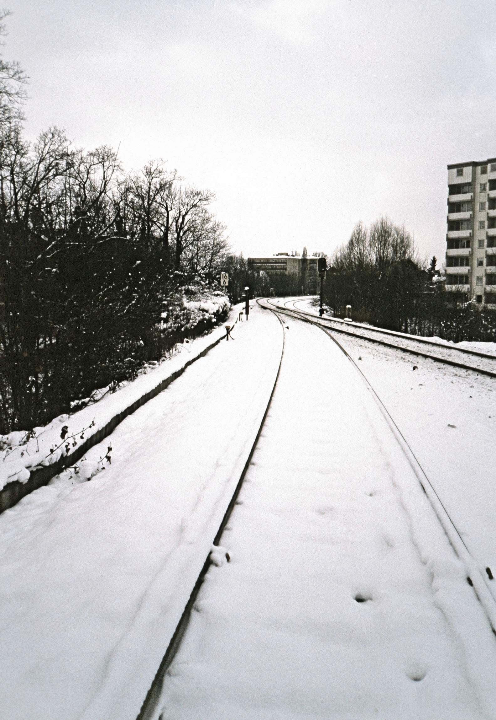 Bayreuth Abzweig Kreuzstein